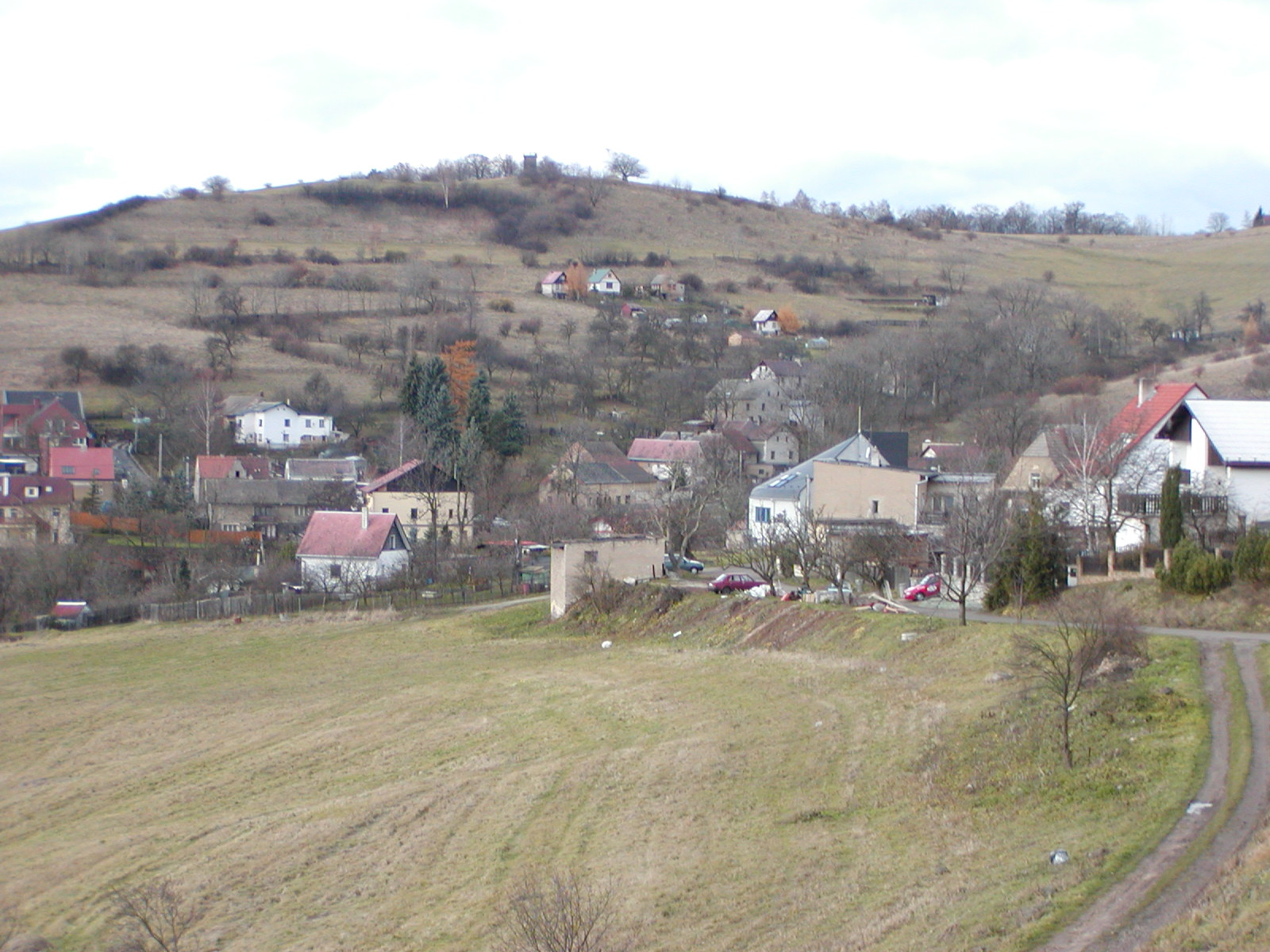 Erbenka